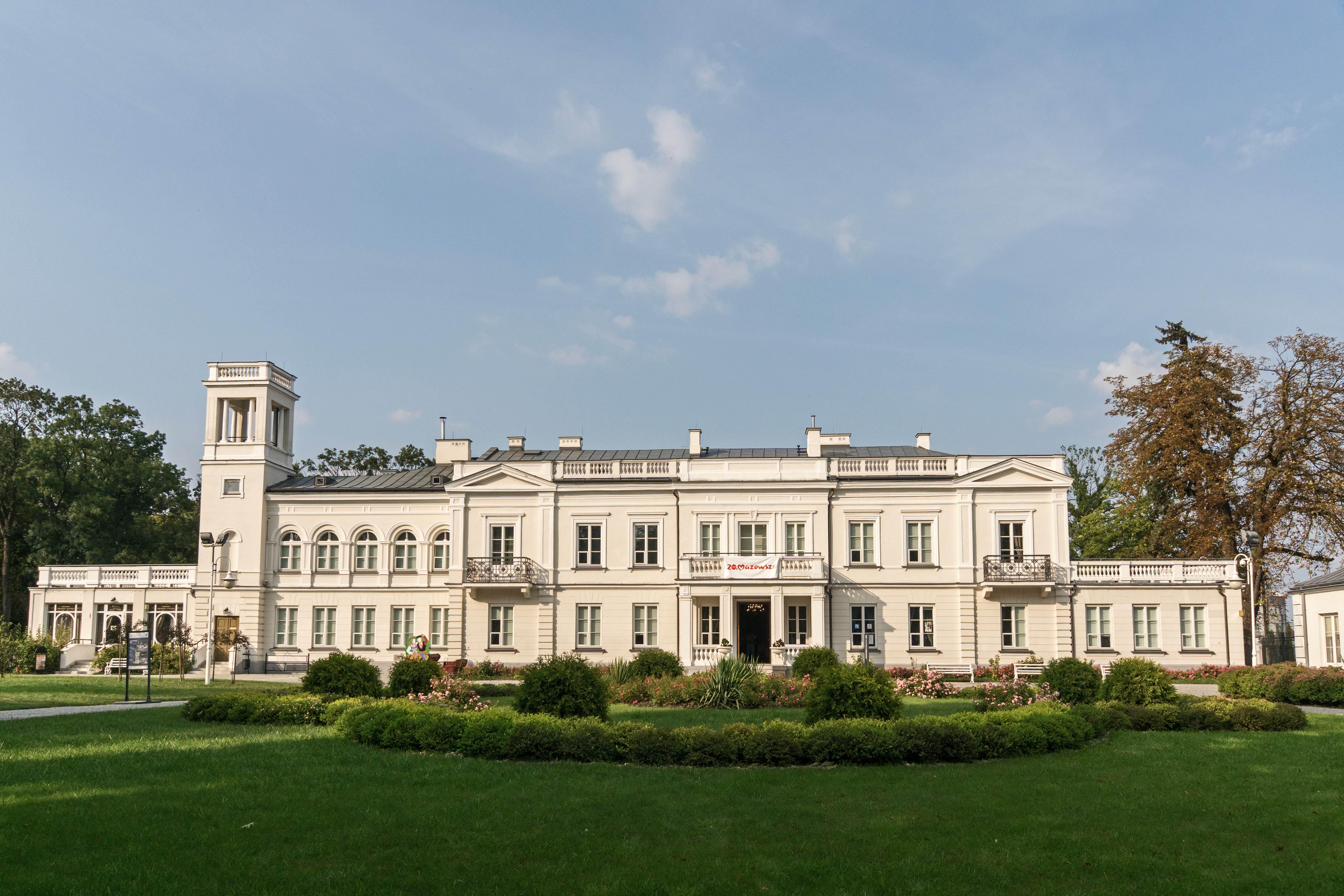 Sanniki, Pałac Wikidata has entry Q30071601 with data related to this item.